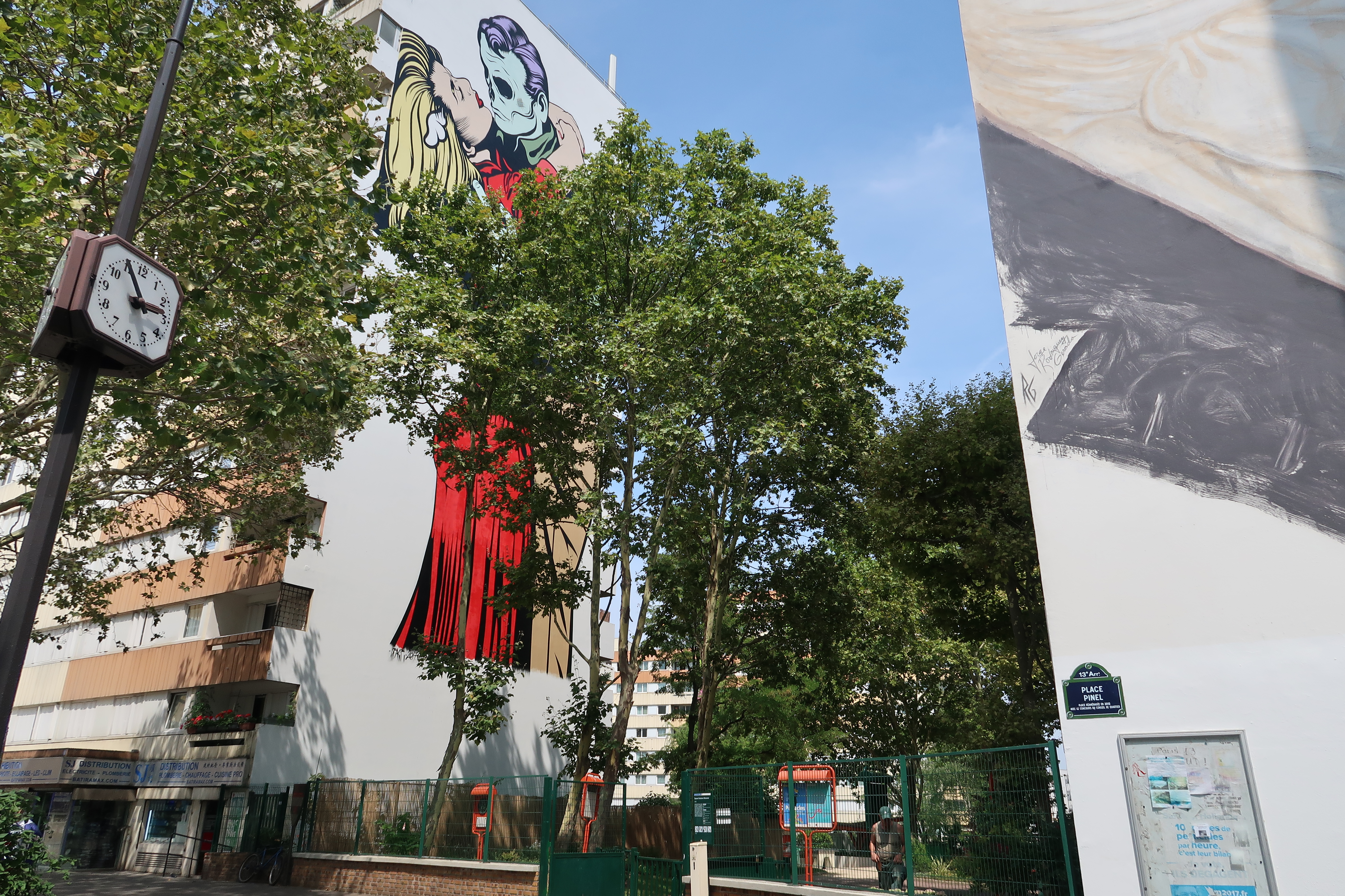 Panneau Histoire de Paris sur le village d'Austerlitz et la cité dorée, place Pinel (Paris, 13e).